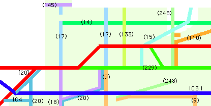 東京都府中市の国道と都道の概略図。